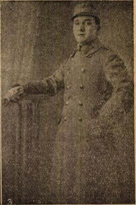 Kabos László (1894–1937) színész